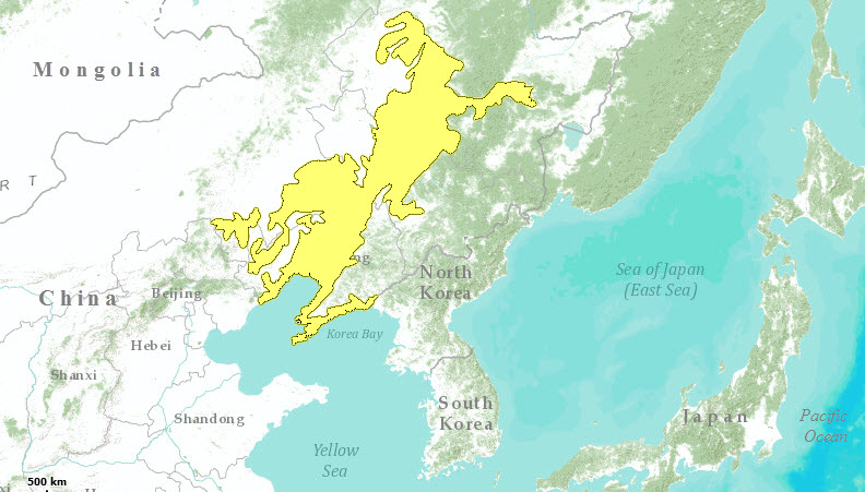 Mappa Ecoregione PA0430 - Foreste decidue della pianura della Cina nord-orientale